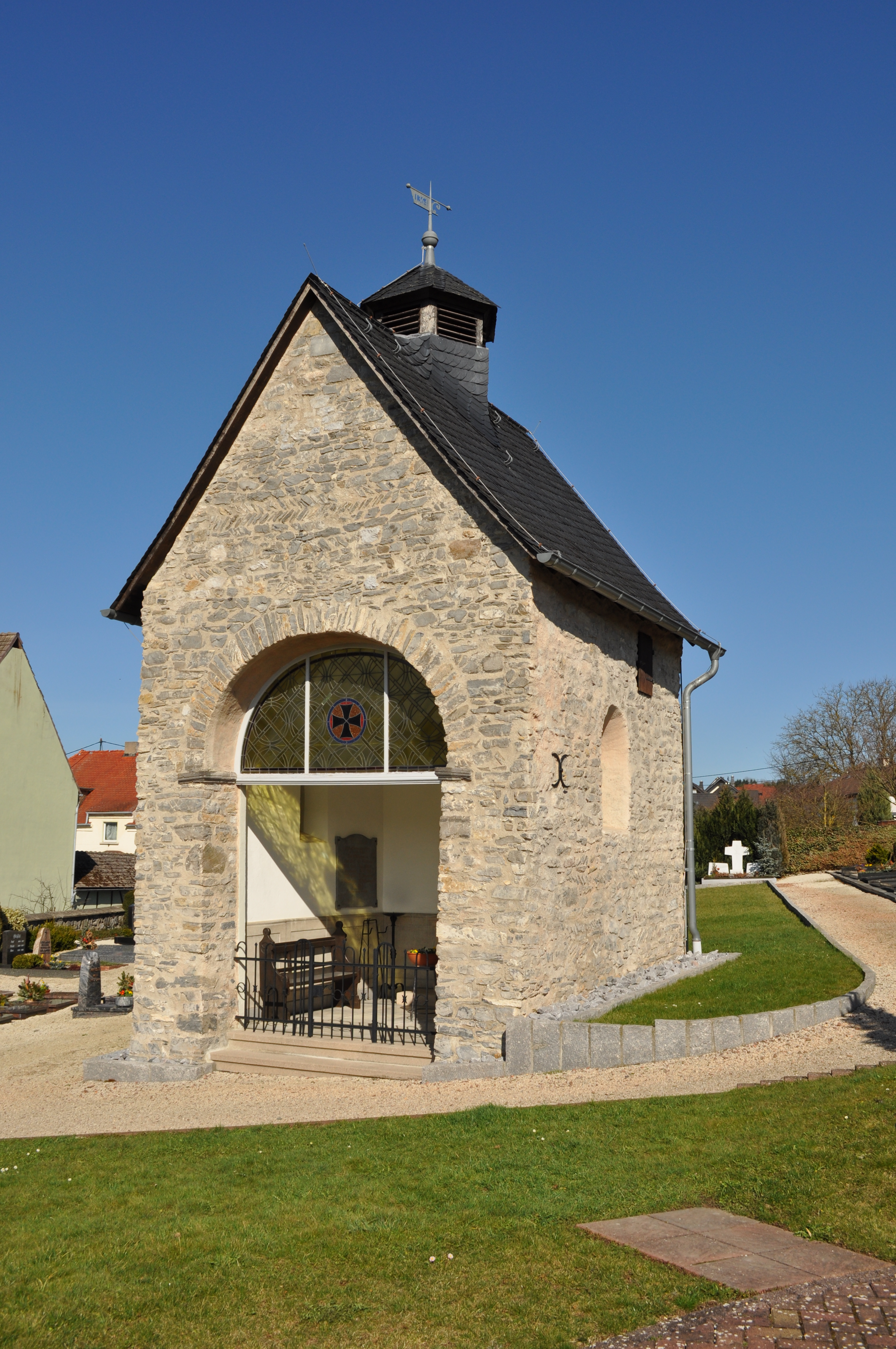 Kriegergedächtniskapelle auf dem Friedhof von Holzheim (Aar). Es handelt sich um einen denkmalgeschützten Bau auf Basis eines romanischen Chors einer untergegangenen Kirche.